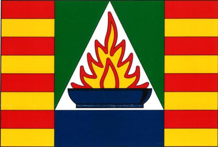 Hlubočky vlajka